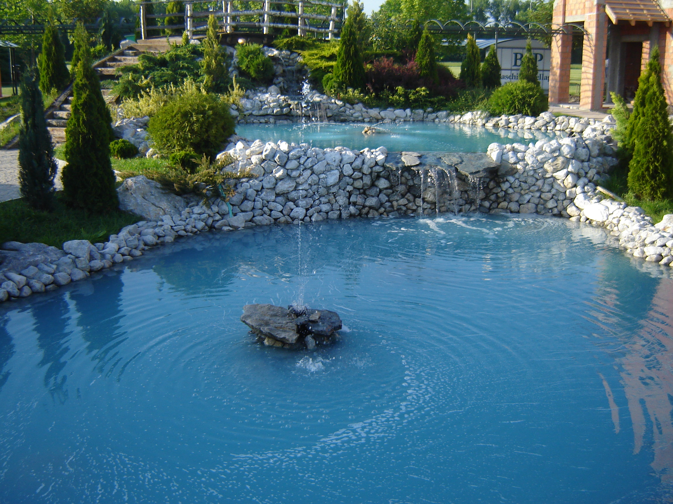 Фонтана, Ковилово 2006, Београд